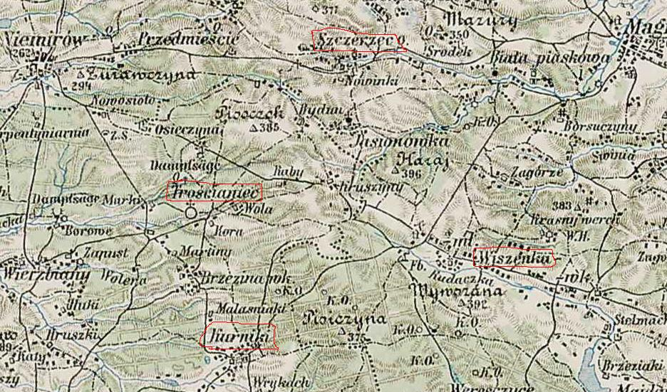 Фрагмен карти з розташуванням сіл (обведені лінією), з яких переселені родини у с. Конопниця